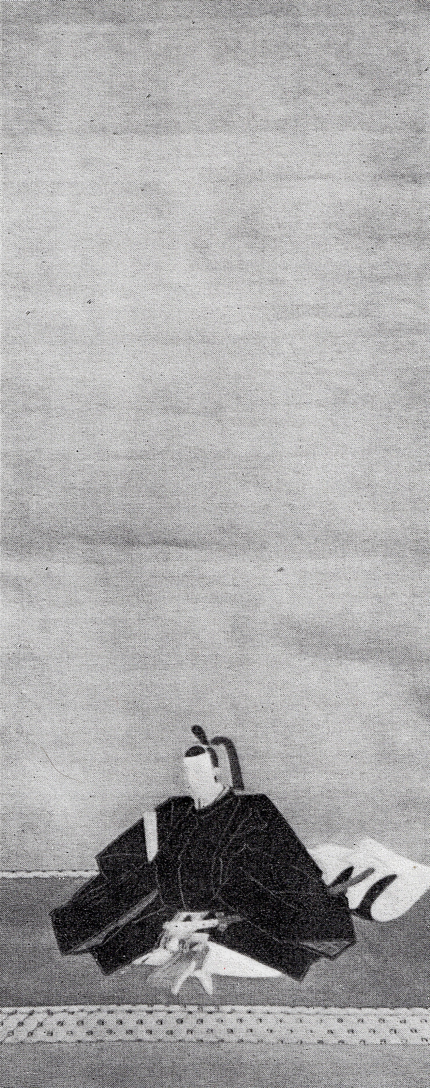 小笠原忠苗の肖像(モノクロ)。